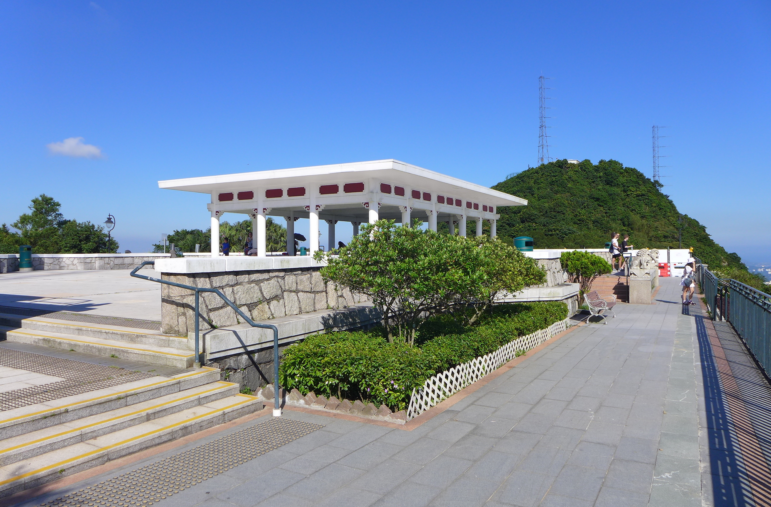 Victoria Peak Garden Pavilion